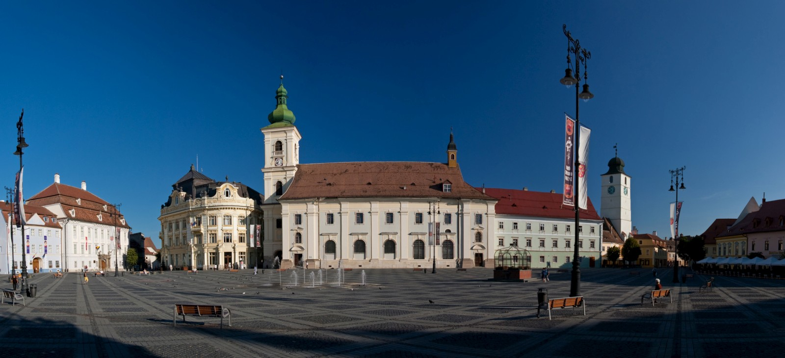 Fotografia prezinta o panorama a Pietei Mari din Sibiu, avand in centru Biserica parohială romano-catolică "Sf. Treime".